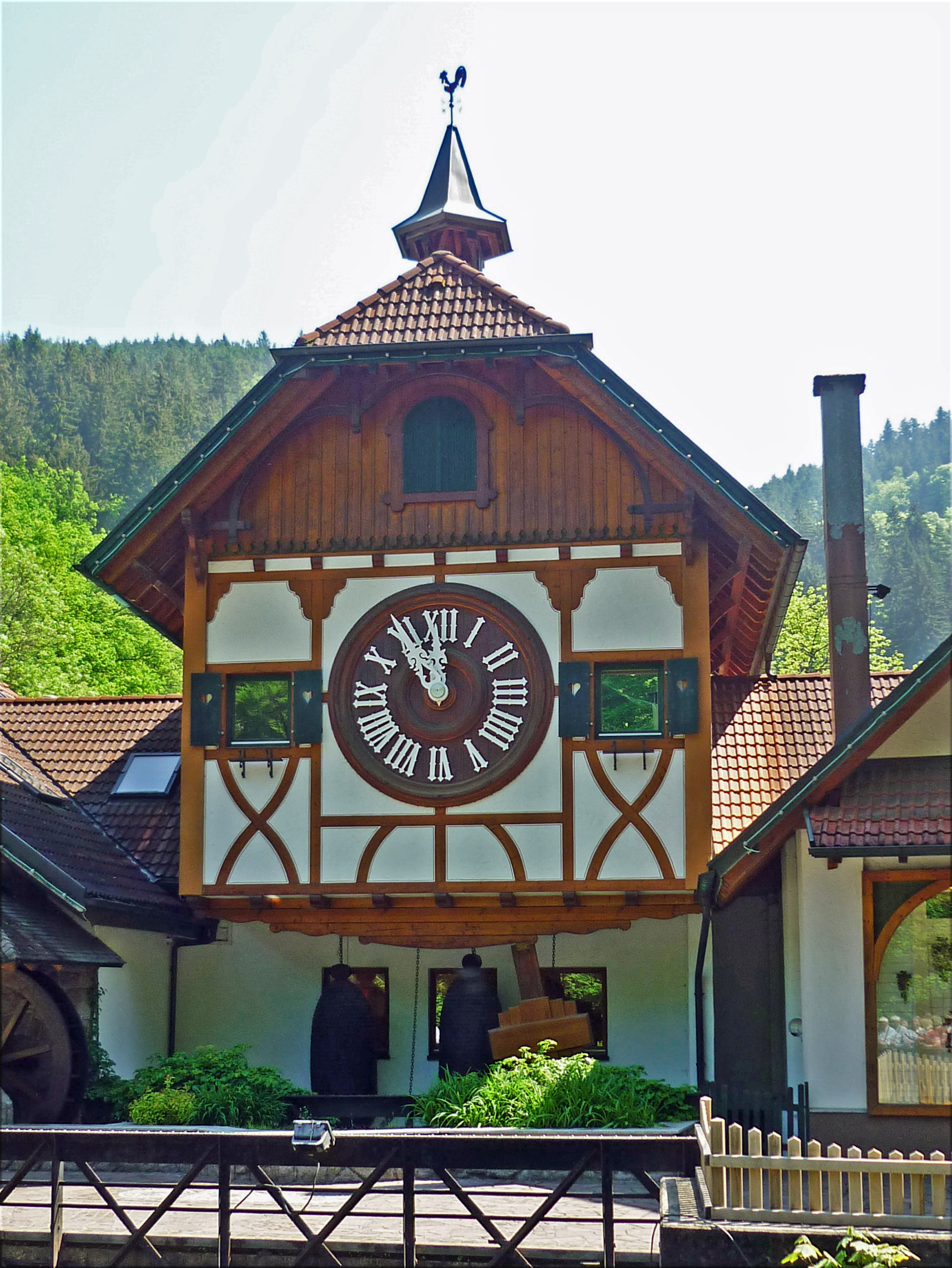 Uhrenhaus bei Schonach im Schwarzwald, Schwarzwald-Baar-Kreis (Baden)